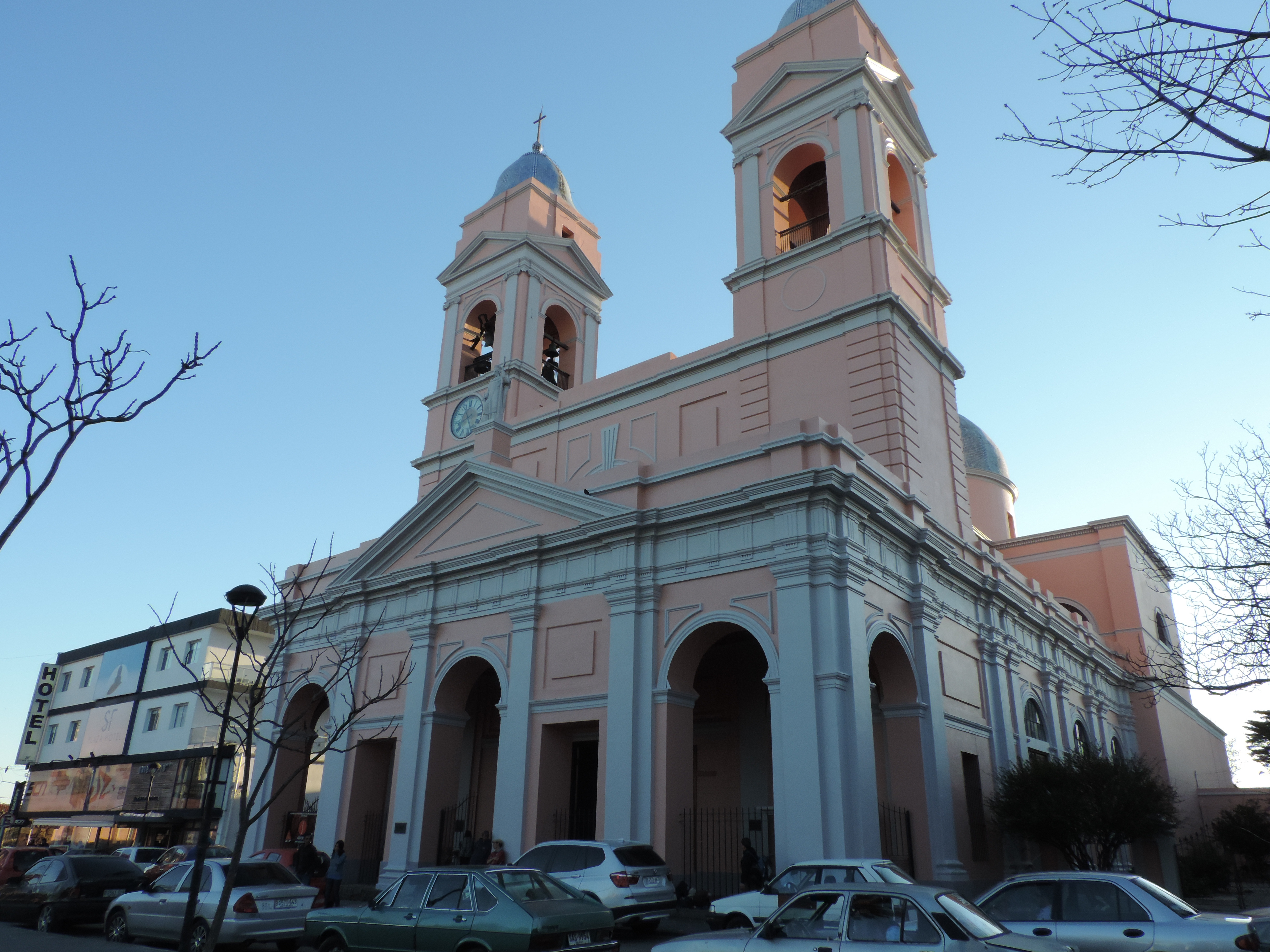 Iglesia Catedral de San Fernando de Maldonado - Cementerio anexo y entornos. Ubicada en el departamento de Maldonado